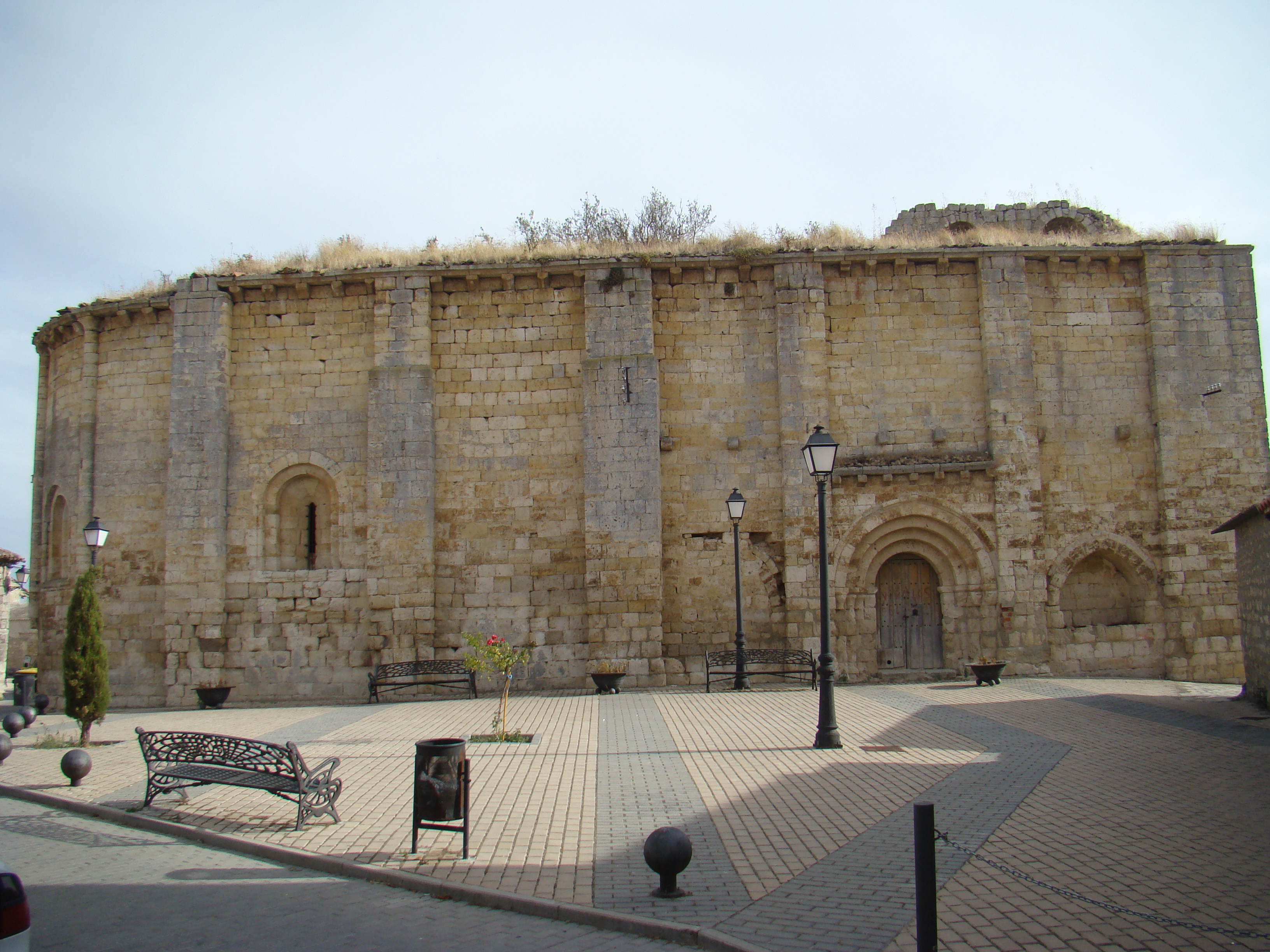 Lateral de la glesia de Santa María del Templo, románica, se encuentra en el municipio vallisoletano de Villalba de los Alcores, España. Es de propiedad particular, puesta en venta desde el año 2001.